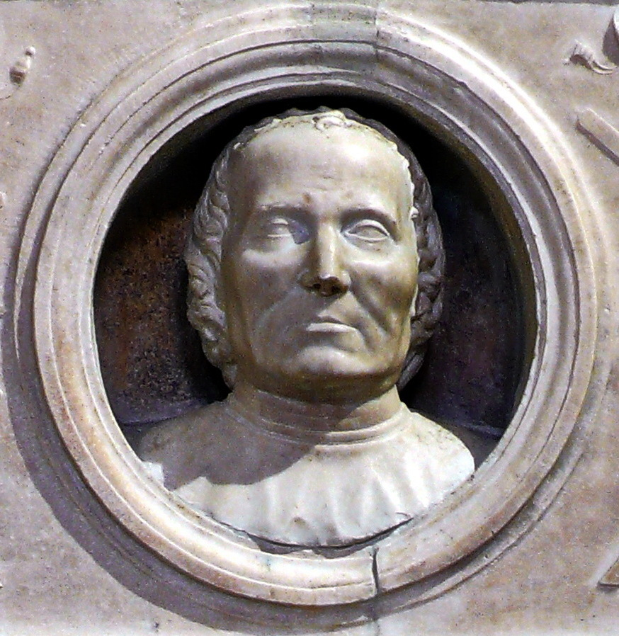 Santa Maria sopra Minerva; Grabmal des Andrea Bregno